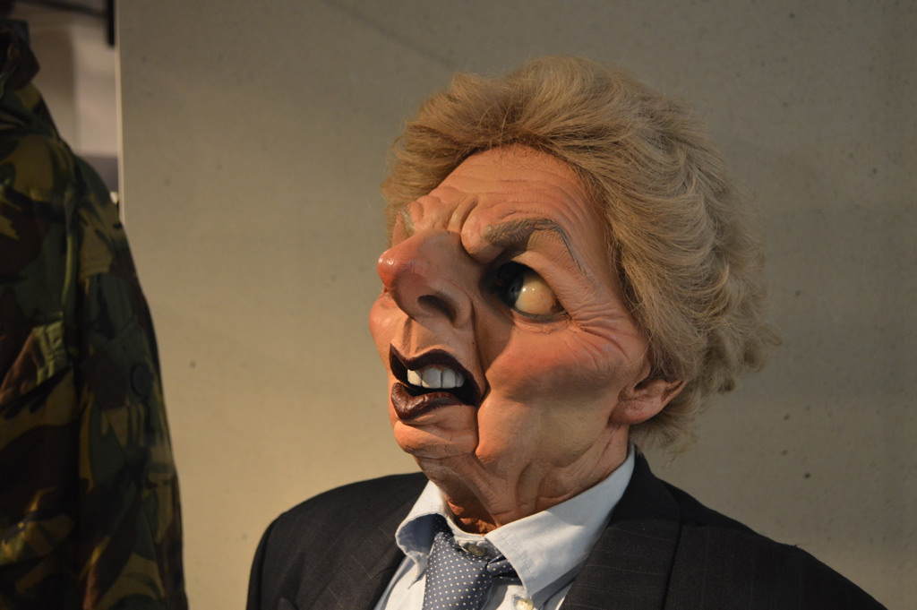 Maggie Thatcher